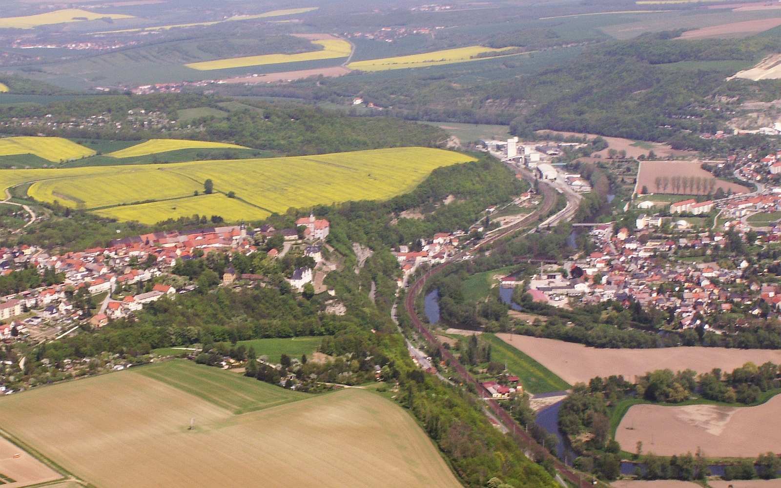 Stadt Dornburg-Camburg seit Dezember 2008 Luftbild Saaletal bei Dorndorf-Steudnitz Foto 2006 Wolfgang Pehlemann Wiesbaden PICT0238